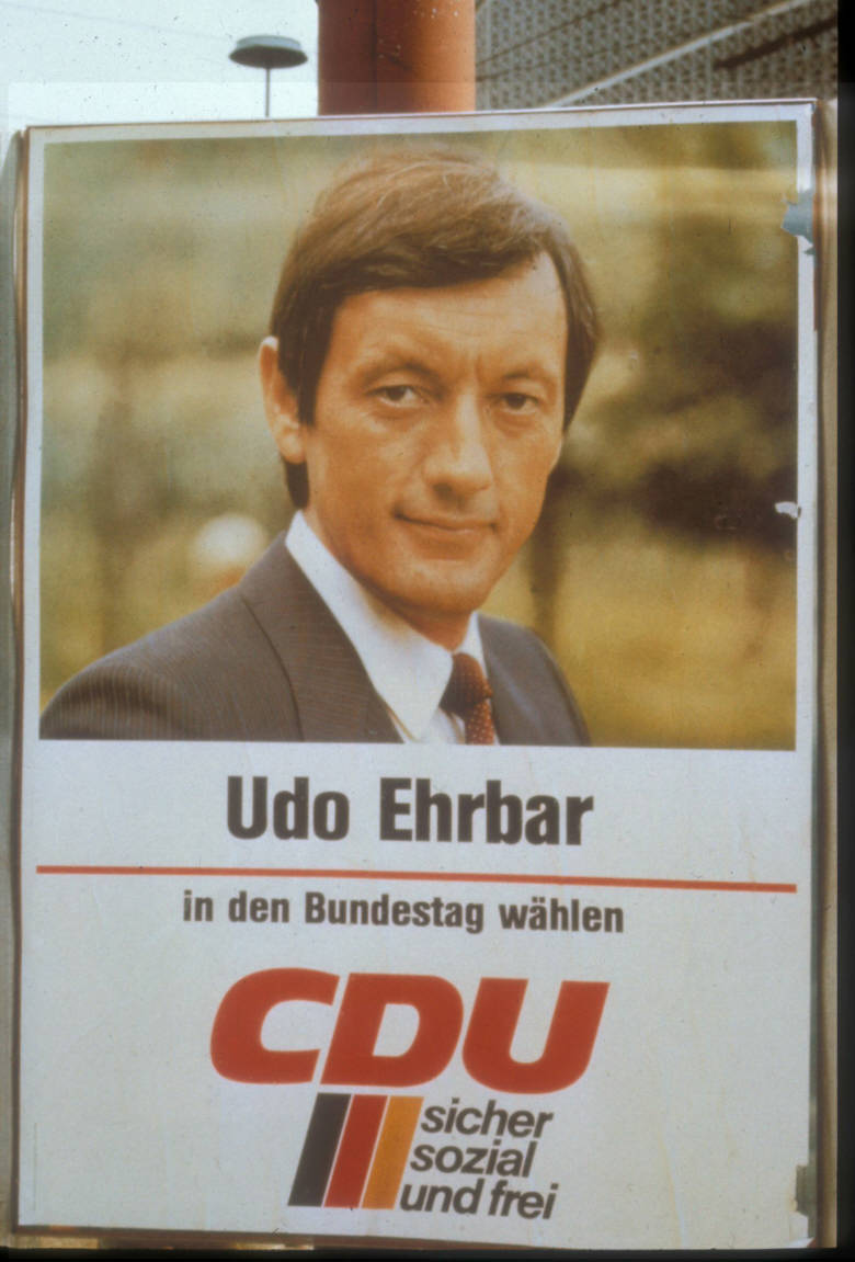 Udo Ehrbar in den Bundestag wählen CDU sicher sozial und frei Abbildung: Porträtfoto Kommentar: Außenaufnahme (Plakatständer) Plakatart: Kandidaten-/Personenplakat mit Porträt Objekt-Signatur: 10-001: 2251 Bestand: Plakate zu Bundestagswahlen (10-001) GliederungBestand10-18: Plakate zu Bundestagswahlen (10-001) » Die 9. Bundestagswahl am 5. Oktober 1980 » CDU » Mit Porträtfoto Lizenz: KAS/ACDP 10-001: 2251 CC-BY-SA 3.0 DE